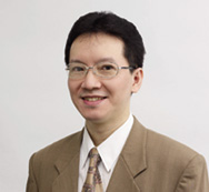 自分の写真